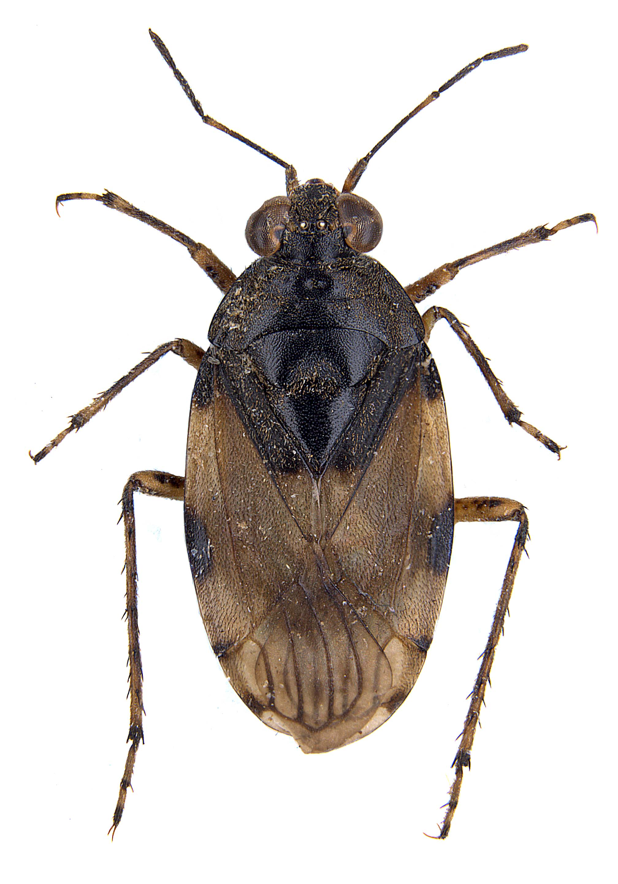 Saldula arenicola, Habitus, specimen in Zoologische Staatssammlung München, Foto: Marianne Müller